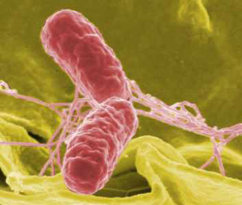 Salmonella (image dérivée de Image:SalmonellaNIAID.jpg)